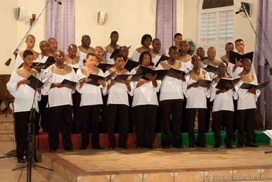 Foto Archief Mannenkoor Concert 2011 Sint Alfonskerk